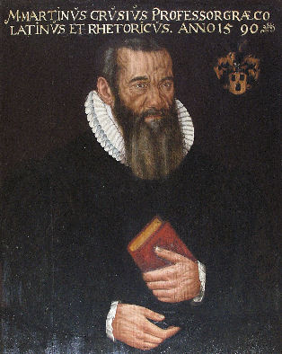 Replik nach einem schlecht erhaltenen Original von Anton Ramsler